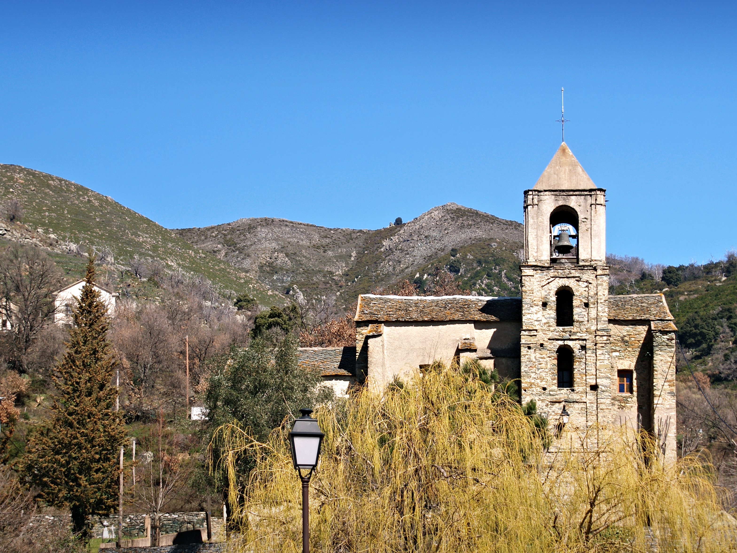 Campitello, Les Costere (Corse) - Église Saint-Pierre